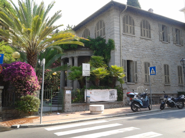 Vue extérieure de la Bibliothèque Civique Internationale